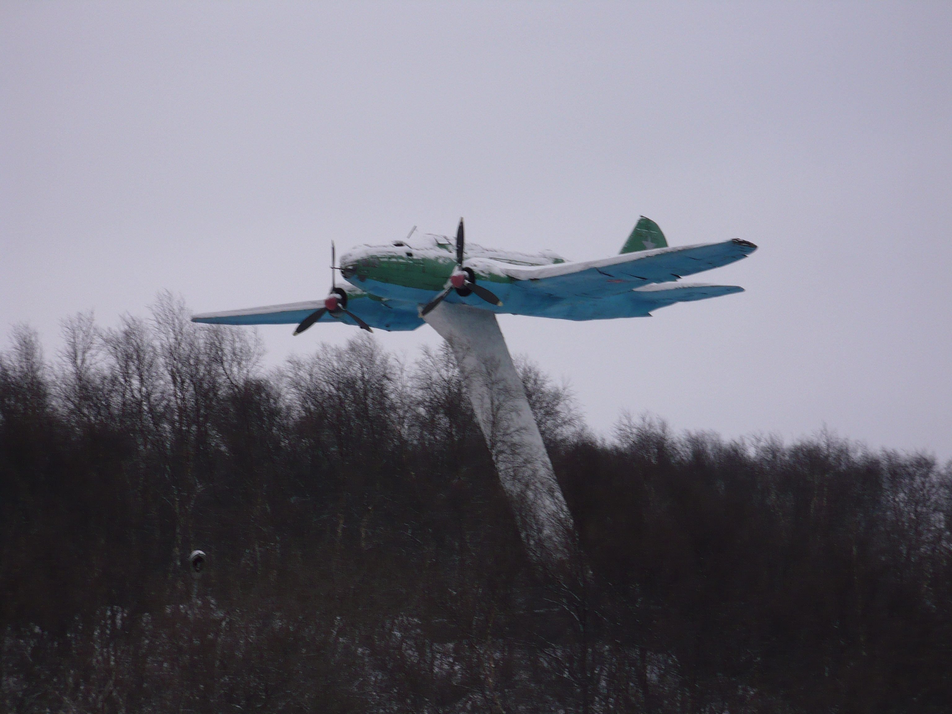 Памятник «ИЛ-4»